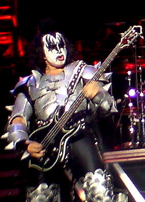 Det här är en manipulerad bild av bandet KISS. Den togs under KISS spelning på Stockholms Stadion.